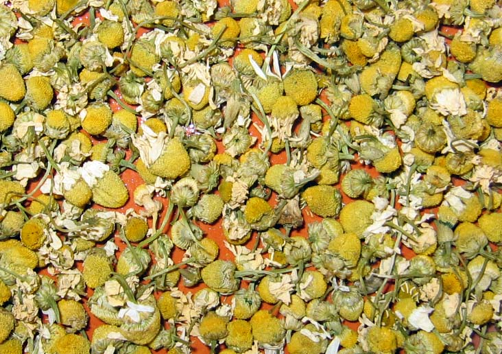 Аутор Снежана Трифуновић моја фотографија септембар 2007.